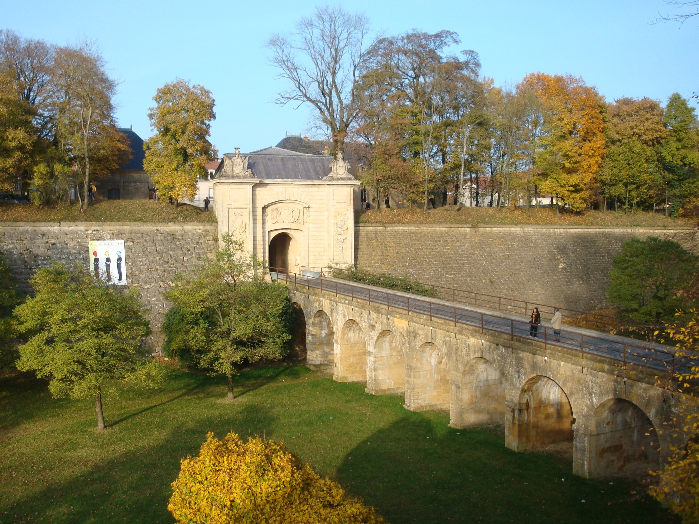 Remparts Vauban à Longwy. La Porte de France en automne.